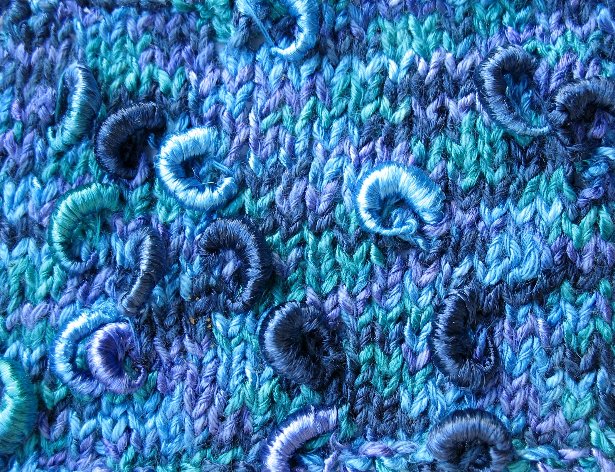 Handgestrick aus Effektgarn